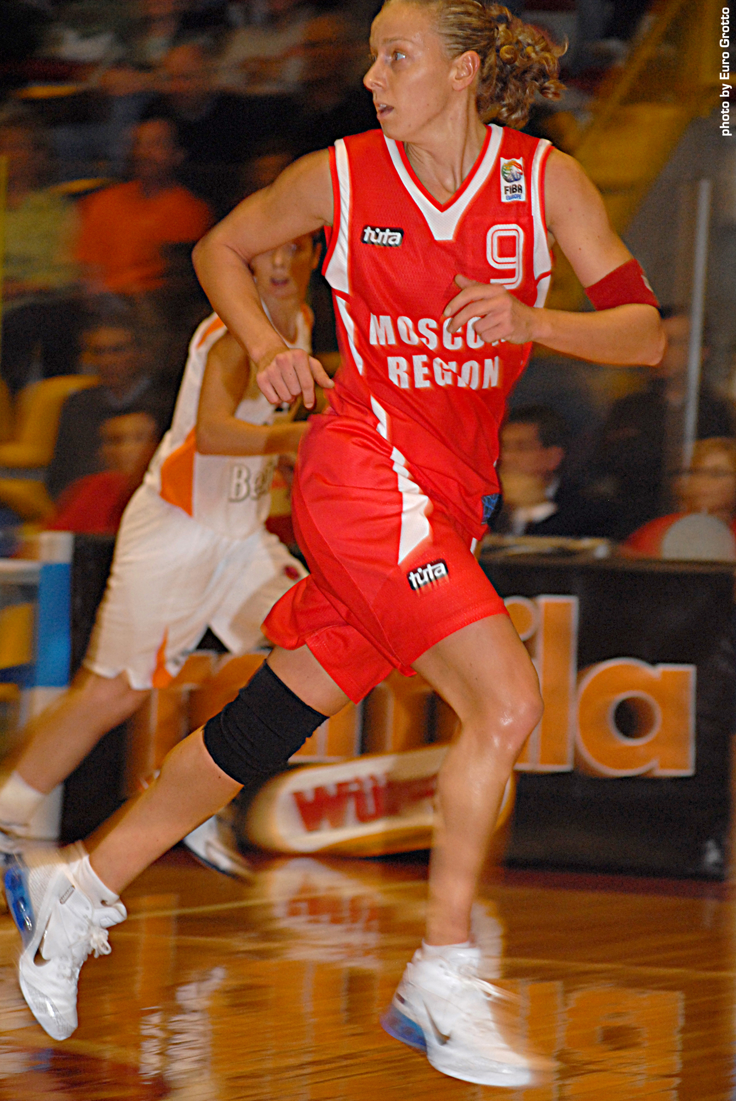 La foto si riferisce all'incontro del 16 novembre 2006 tra lo Spartak Mosca e il Famila di Schio Italy, photo by Euro Grotto :Tolto il bordo bianco.